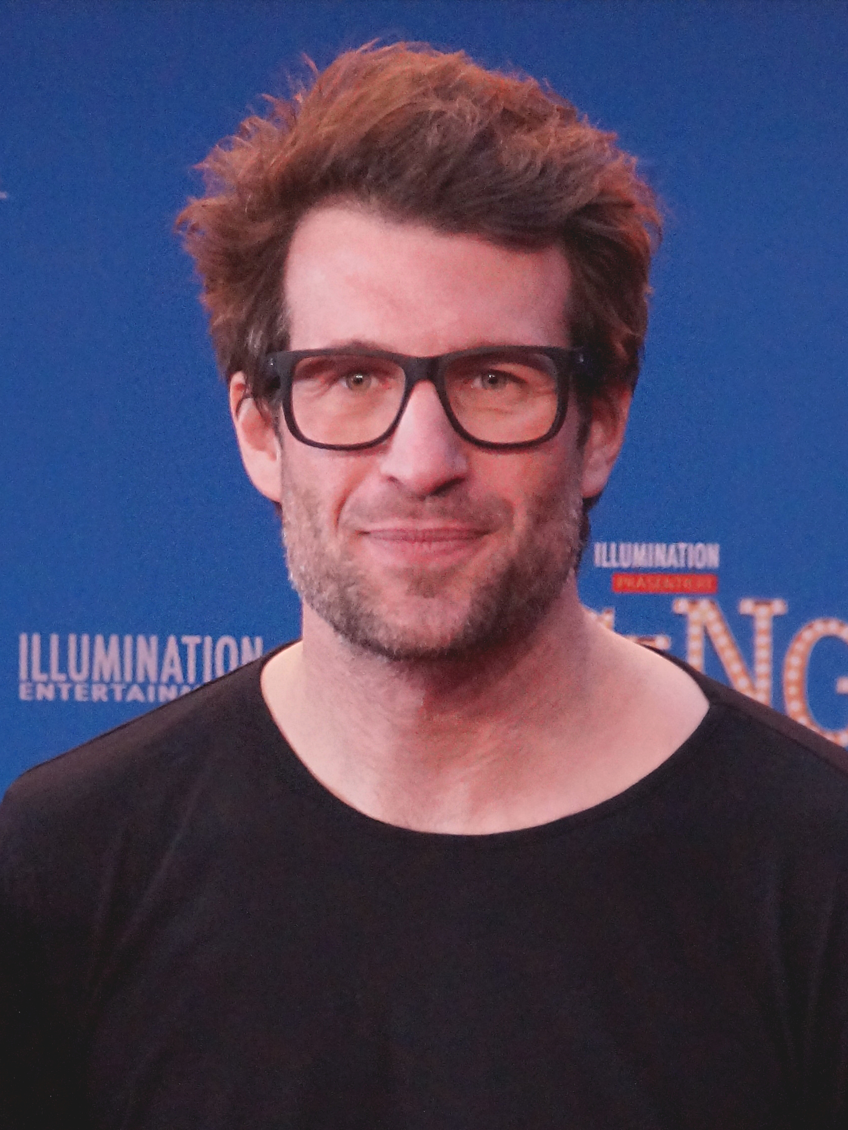 Daniel Hartwich bei der Europa-Premiere des Animationsfilms "SING", am 27.11.2016 im Kölner Cinedom.